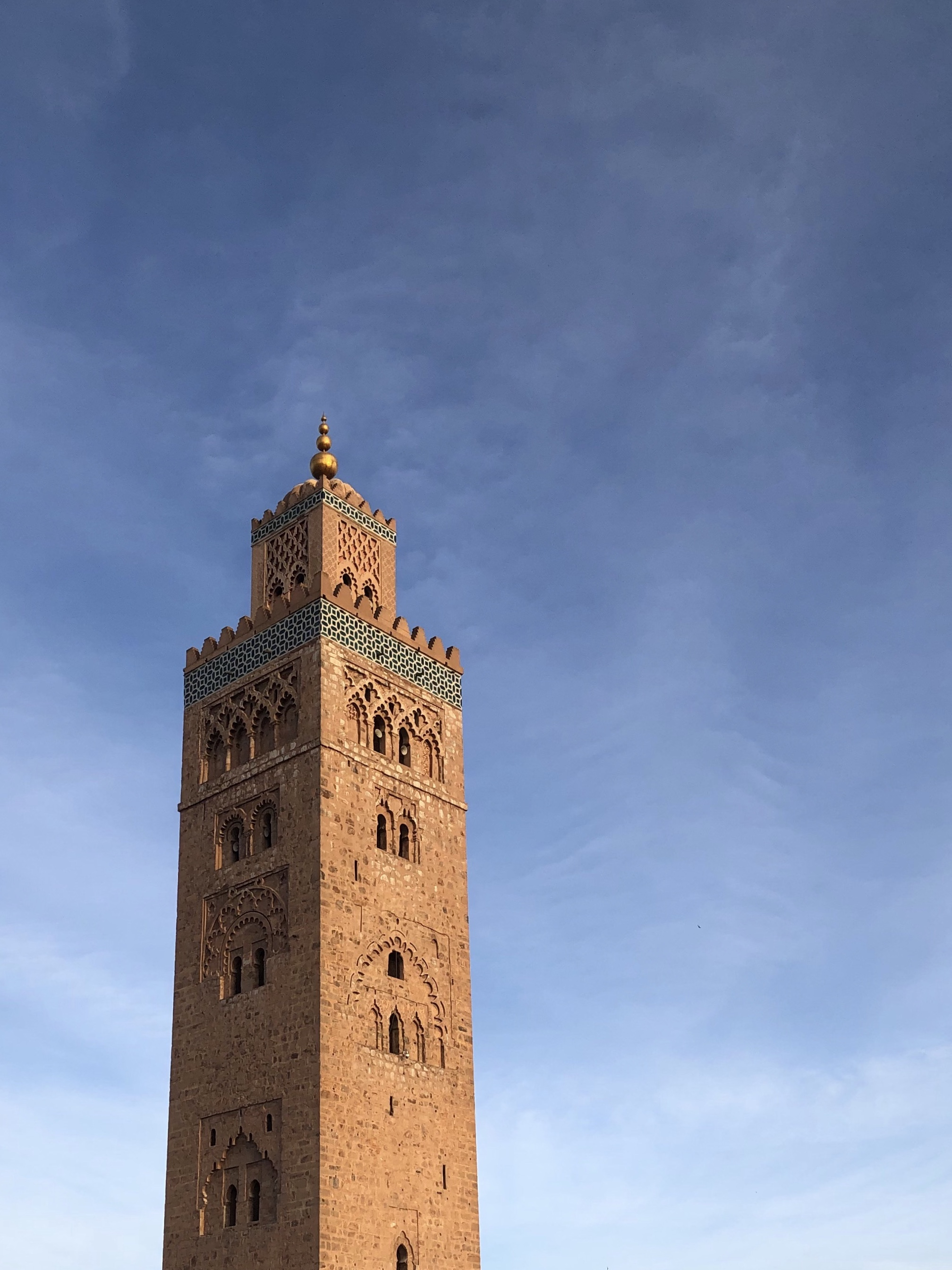 صورة لصومعة (مئذنة) مسجد الكتبية الجامع الذي سمي على سوق مختص بالكتب بجانبه في عهد الموحدين